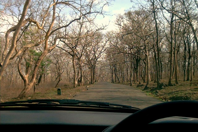 Sathyamangalam Forest